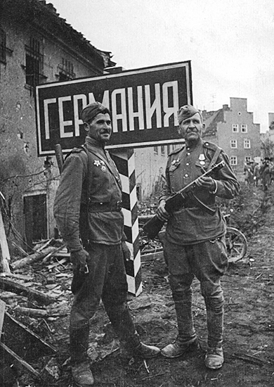 Восточно-Прусская наступательная операция. На границе Германии.